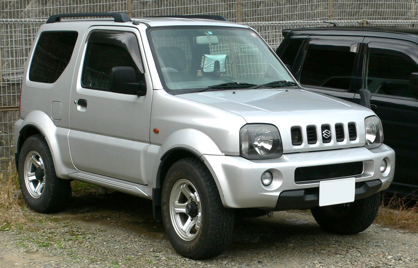 3rd generation Suzuki Jimny (1998 - 2002)